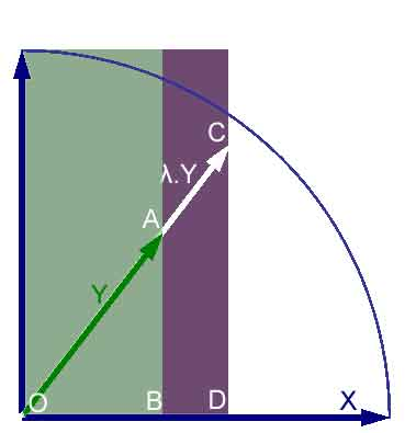 Troisième de la série. Figure illustrant la compatibilité du produit scalaire avec la multiplication externe.